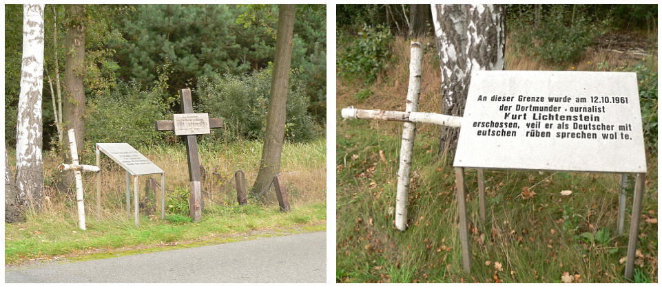 Gedenkstätte für den 1961 von DDR-Grenztruppen erschossenen Journalisten Kurt Lichtenstein aus Dortmund, der an der Kreisstraße 85 zwischen Parsau-Kaiserwinkel und Zicherie mit Landarbeitern auf DDR-Gebiet sprechen wollte.